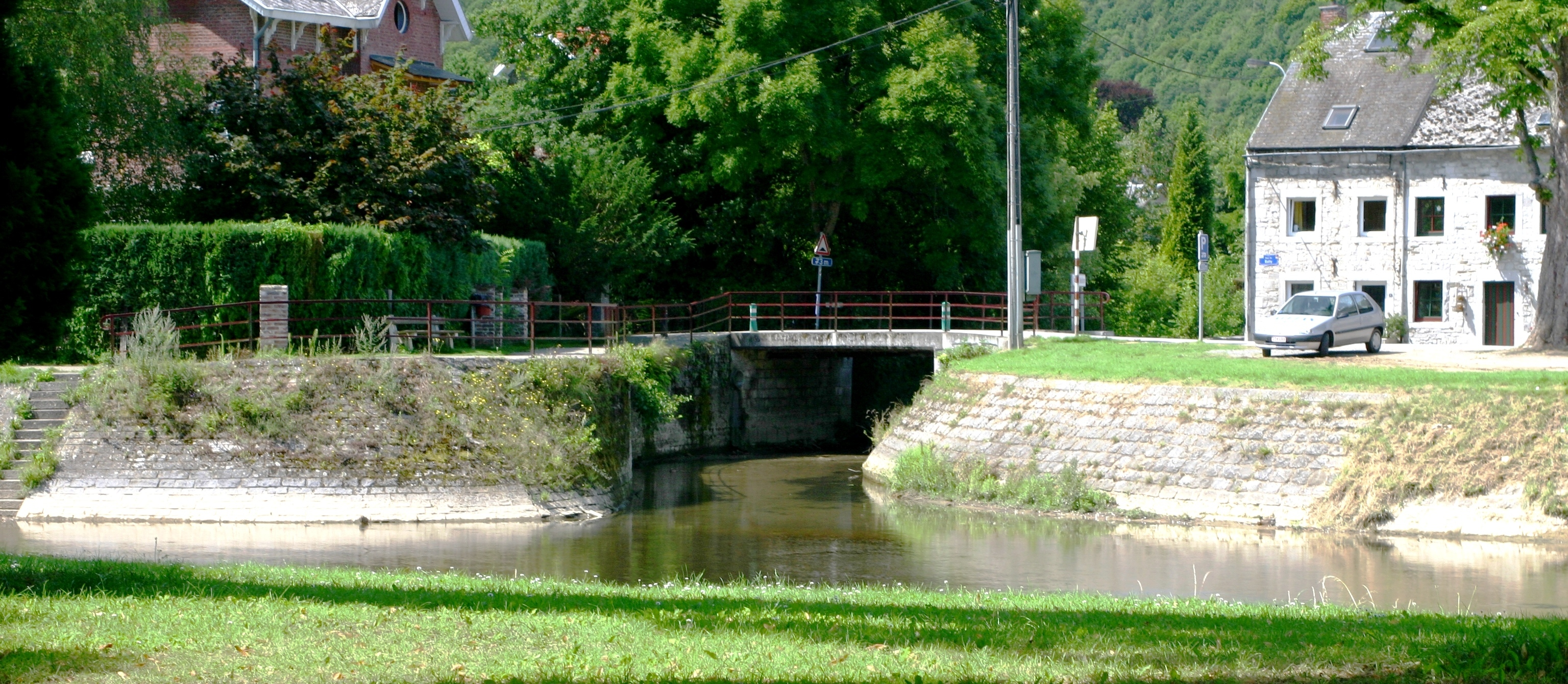 Mëndung vum Néblon zu Hamoir Quell:eege Foto Les Meloures